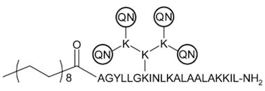 PepFect6. QN – trifluorometüülkinoliini jäägid